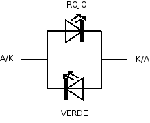 esquema de un diodo LED bicolor